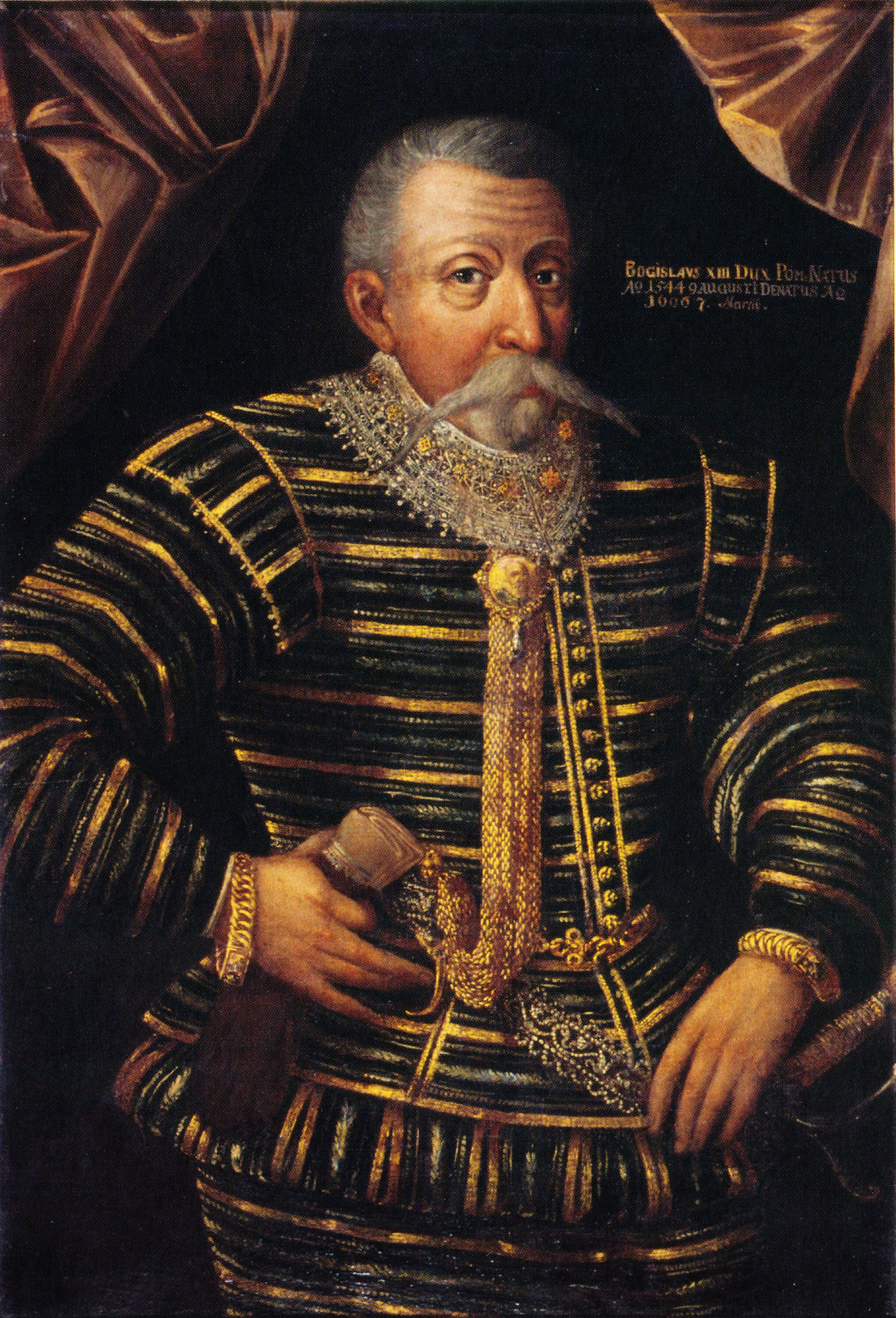 Ölgemälde von Herzog Bogislaw XIII. von Pommern, Kopie nach einer Vorlage im Alten Rathaus in Anklam